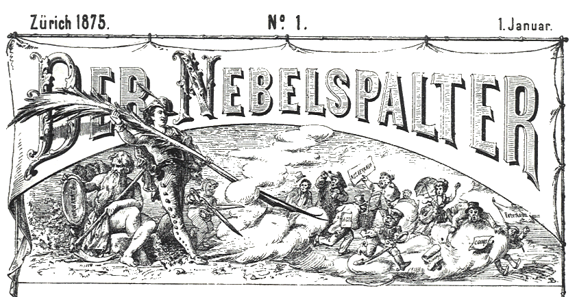 Manchette illustrée du premier numéro de Der Nebelspalter, revue satirique suisse créée en 1845.